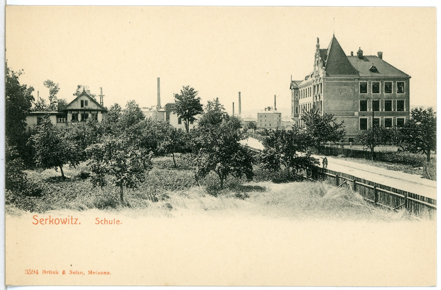 Serkowitz; Schule This postcard is from publisher Brück & Sohn in Meißen ( postcard has a unique number 03594 and is available in a higher resolution at the publisher. This images was uploaded in a cooperation project between Wikipedians and the publisher.